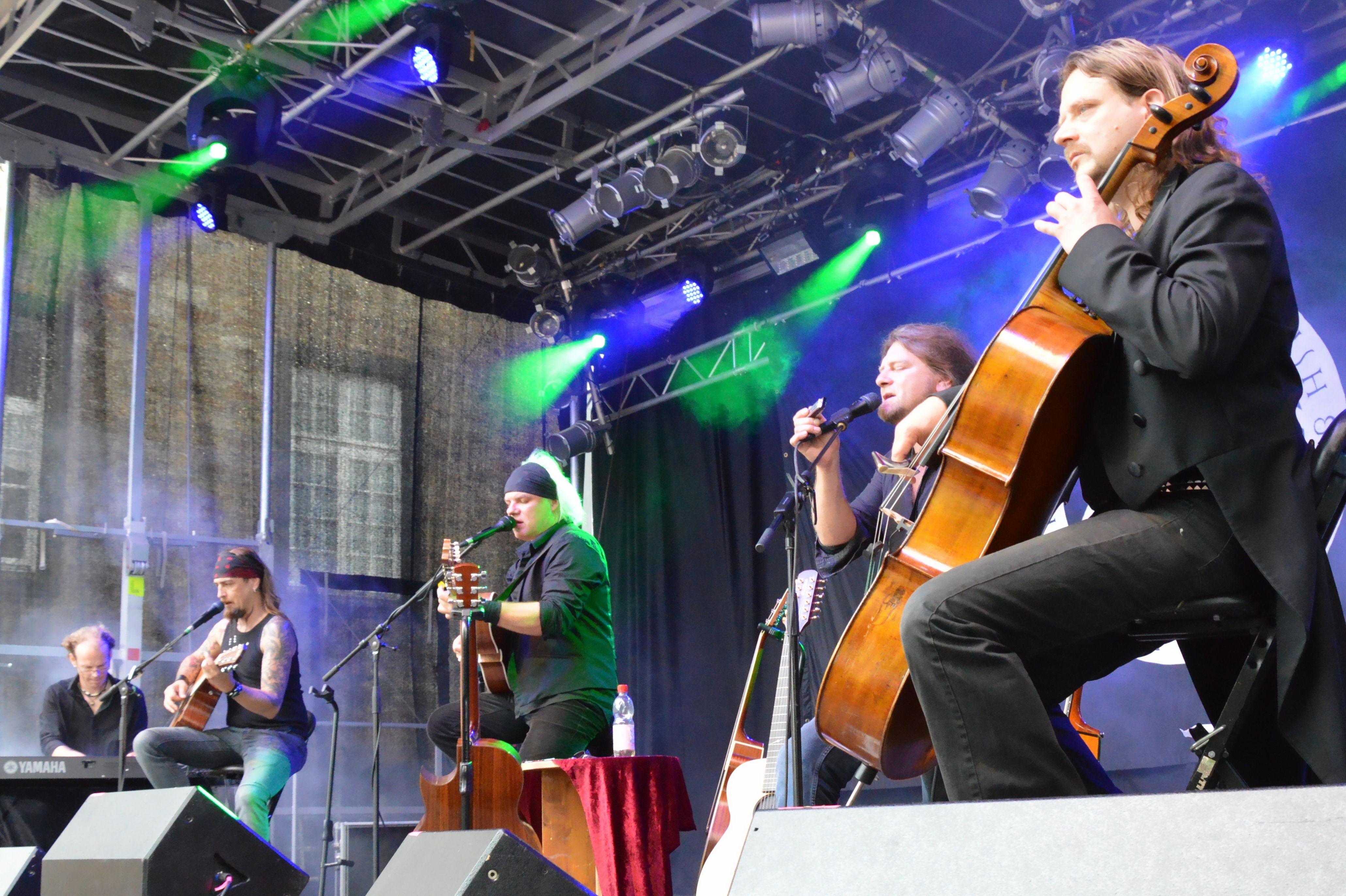 Eric Fish and Friends beim Burgfolk Festival 2013 auf Schloß Broich